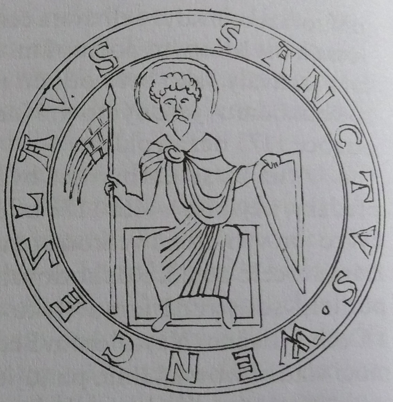 Pečeť Přemysla Otakara I. 1192-1193 - revers